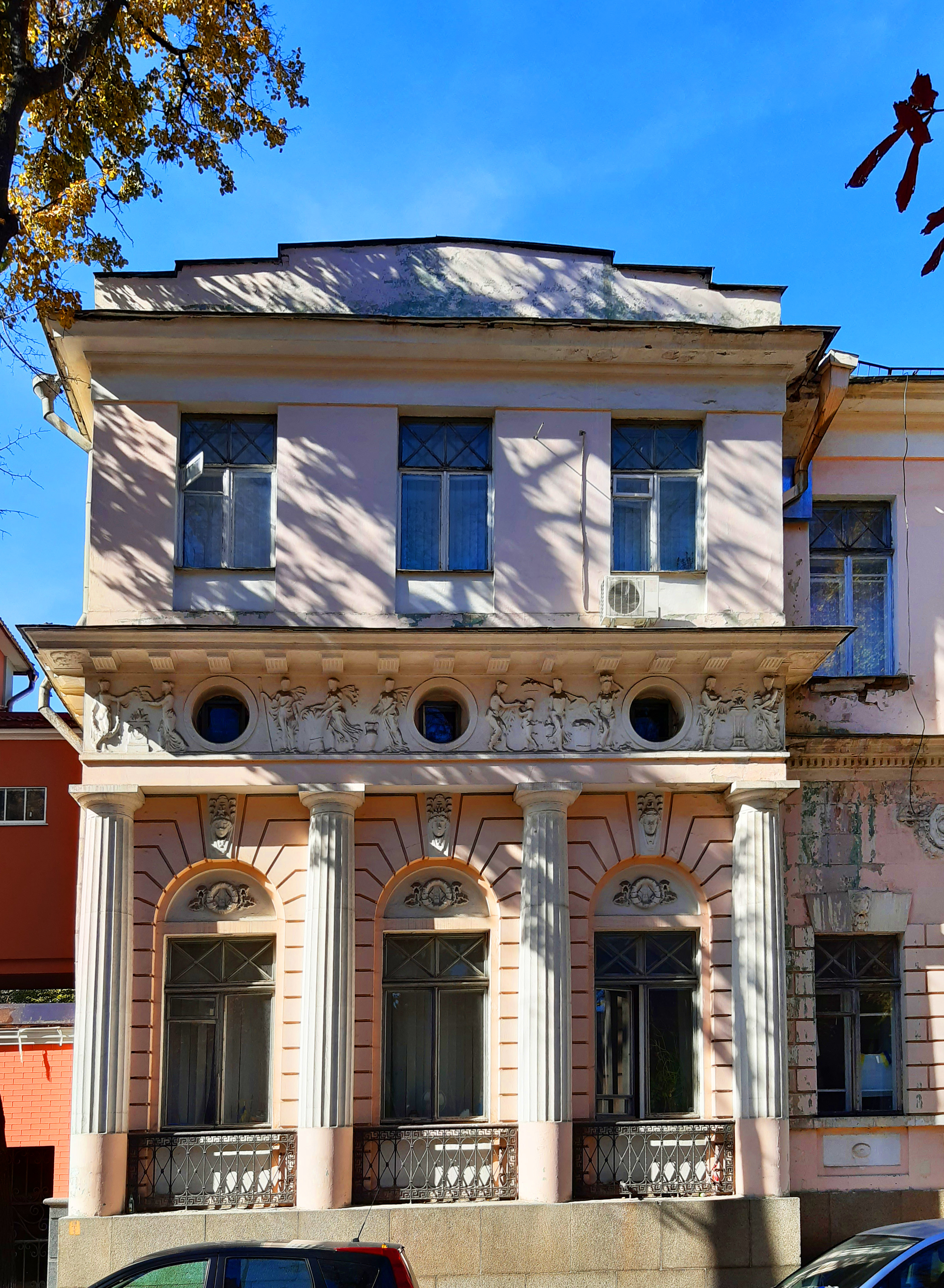 Садиба на Липський, Київ, Липська вул., 16